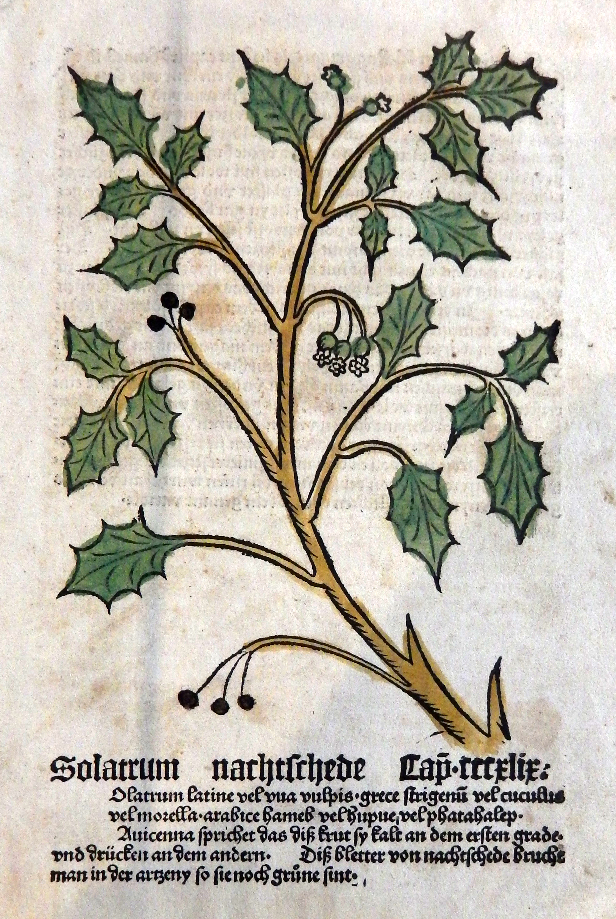 Abbildung von Solanum nigrum